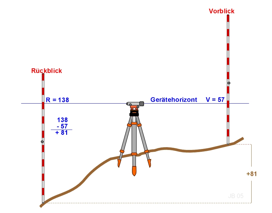 Beispiel für einen Nivellementsstandpunkt Grafik: Joachim Baecker 2005